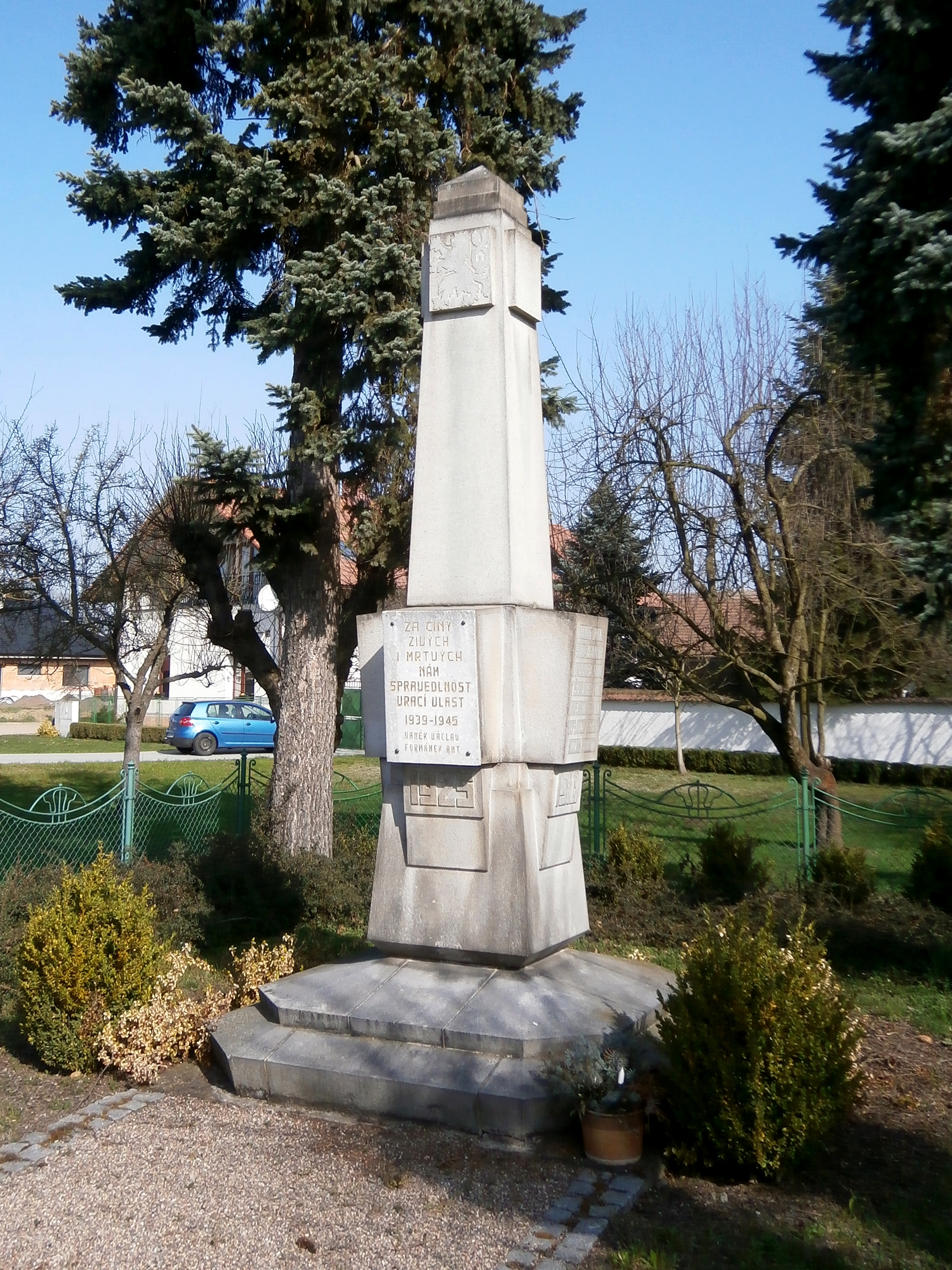 Pomník padlým (Pohřebačka)